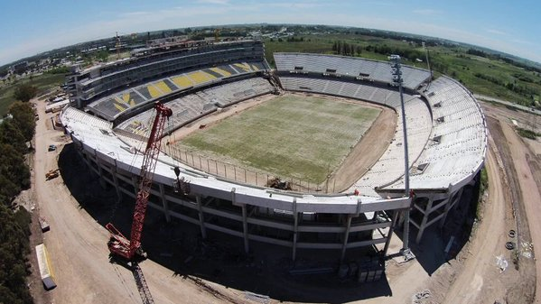 Avances de la obra en noviembre del 2015